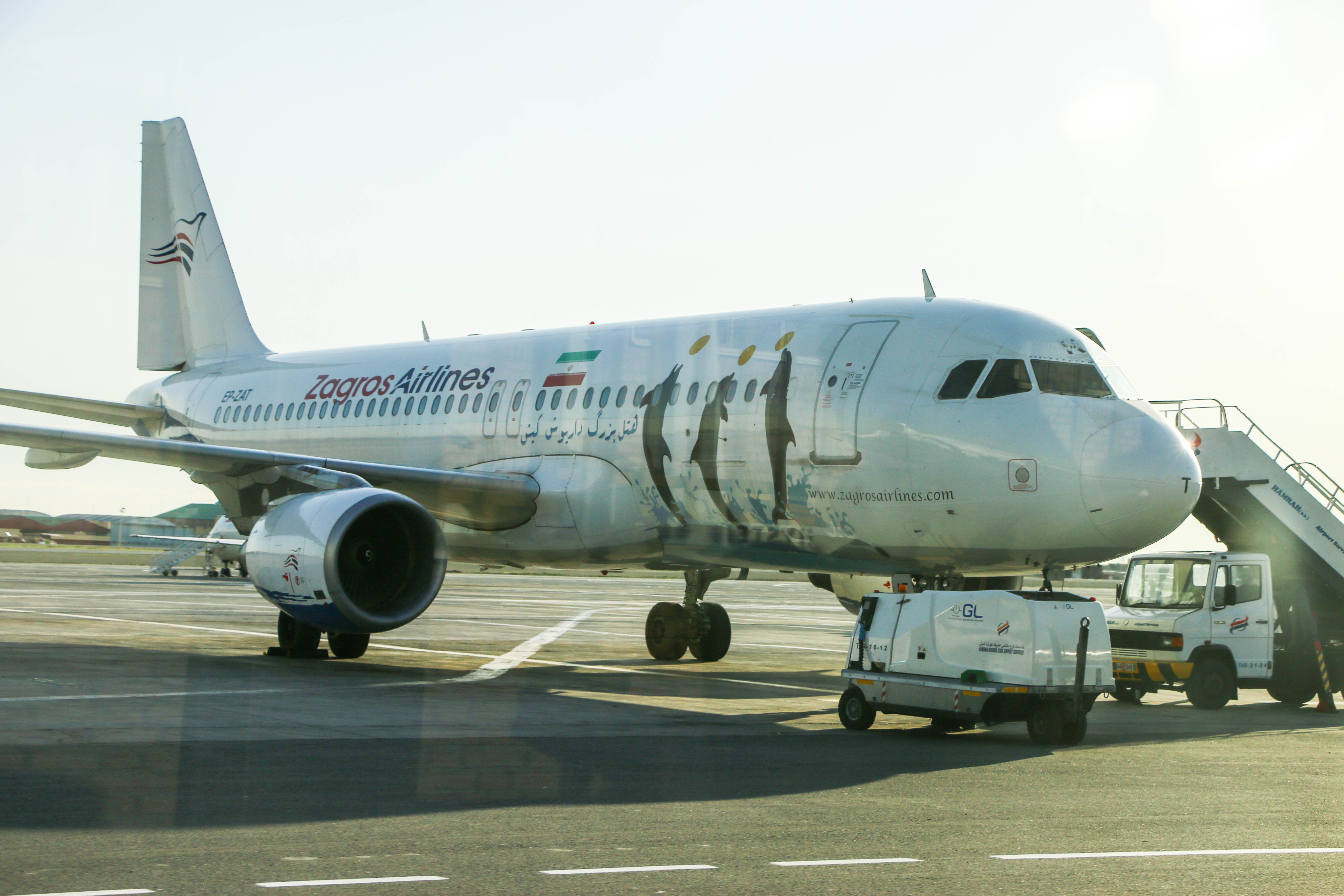 یک هواپیمای زاگرس در فرودگاه مهرآباد - عکس از محمدامین نوبهار